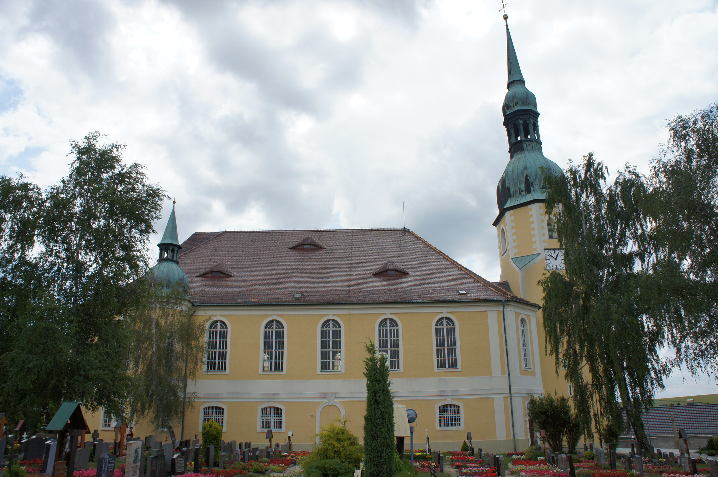 Katholische Kirche St. Simon und Juda in Crostwitz. Gründung im 14. Jh.; Neubau 1769-72; Umbau 1898-99. Nordansicht Hornjoserbsce: Cyrkej swjateju Symana a Judy w Chrósćicach; Napohlad ze sewjera.